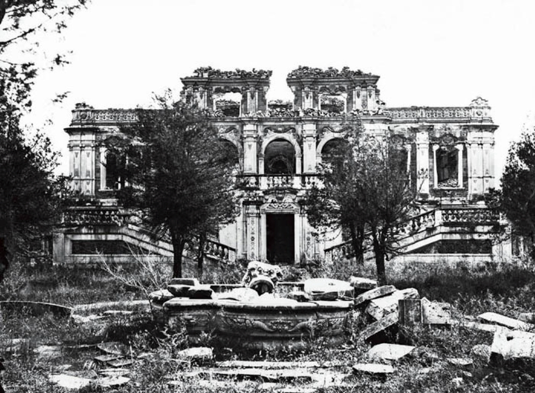 圆明园西洋楼谐奇趣废墟北侧，恩斯特·奥尔末（Ernst Ohlmer）拍摄，1872年-1873年之间